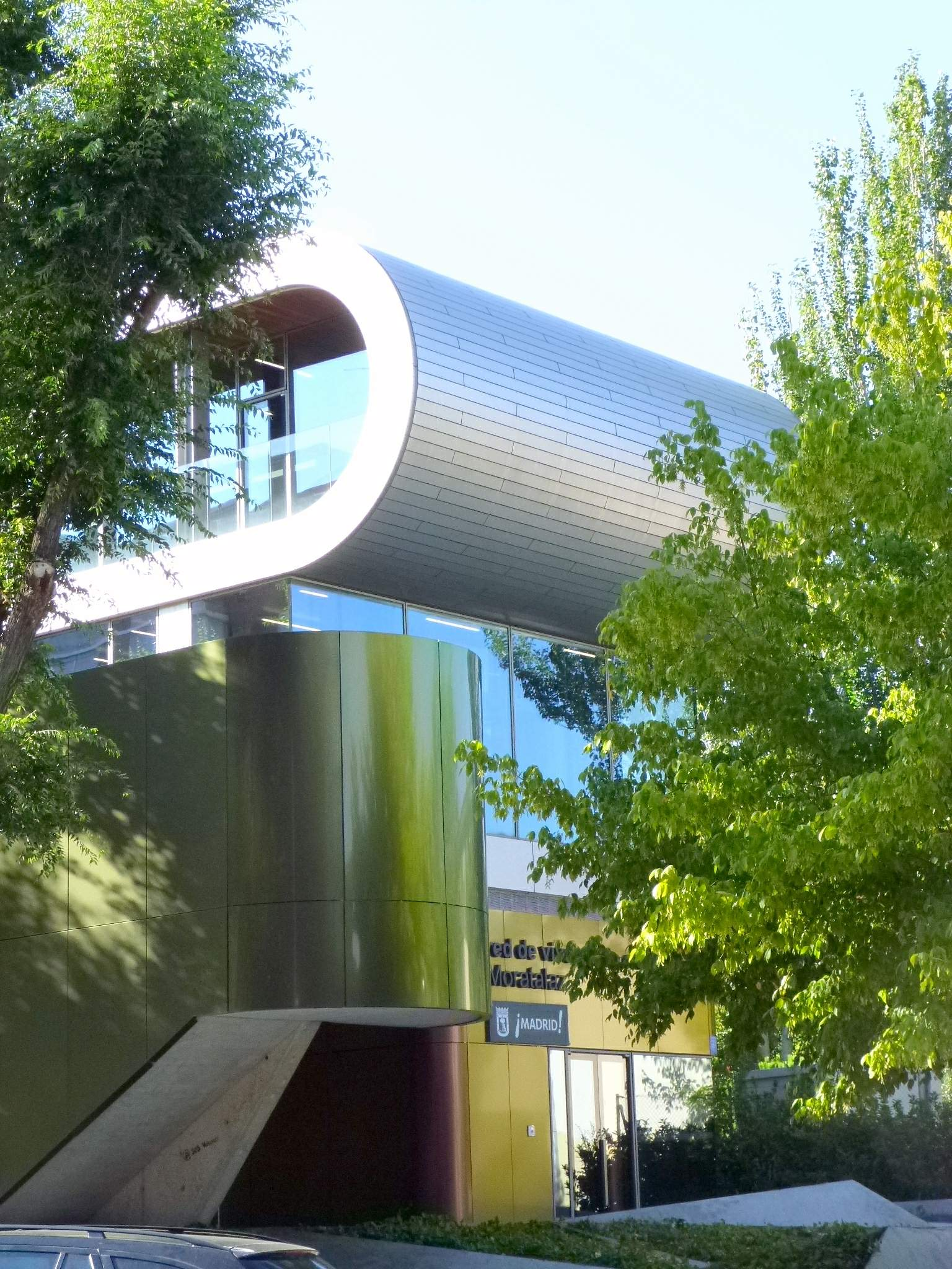 Red de Viveros de Empresas de Moratalaz (Madrid)